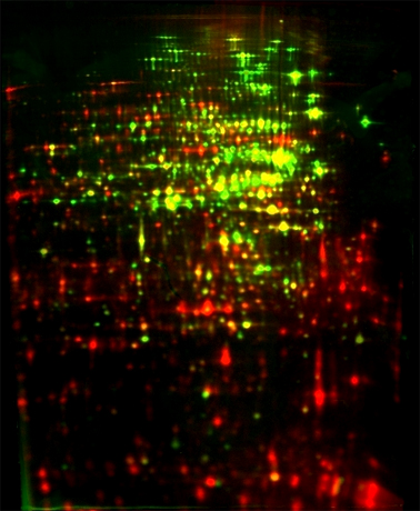 Zweikanalbild eines 2D Gels; roter Kanal neu synthetisiere Proteine; grüner Kanal akkumulierte Proteine